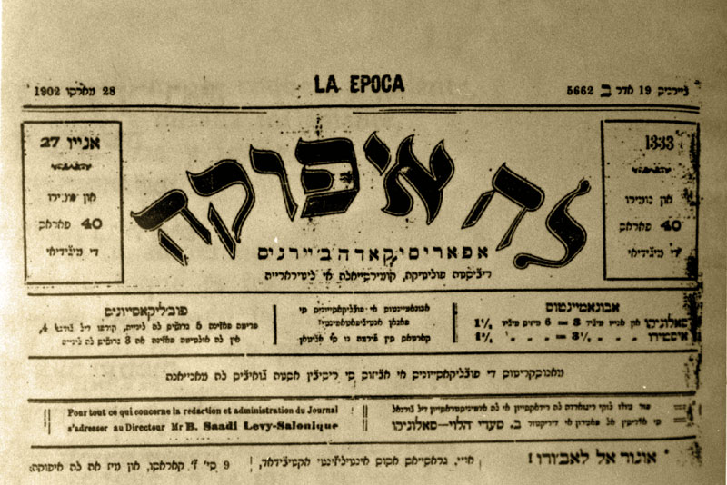 Главата на вестник "Епока" (1875 - 1912).